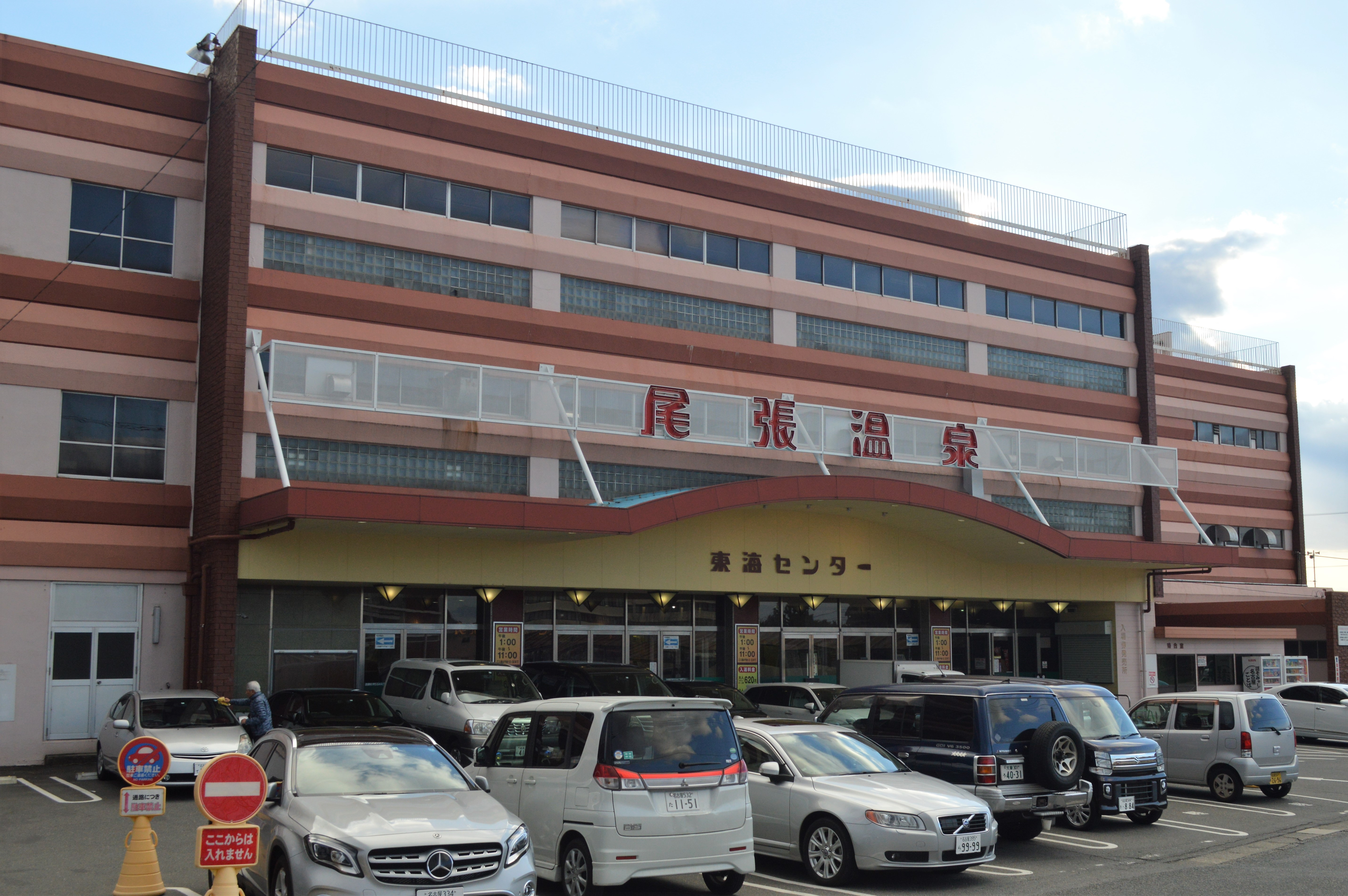 愛知県海部郡蟹江町にある尾張温泉。